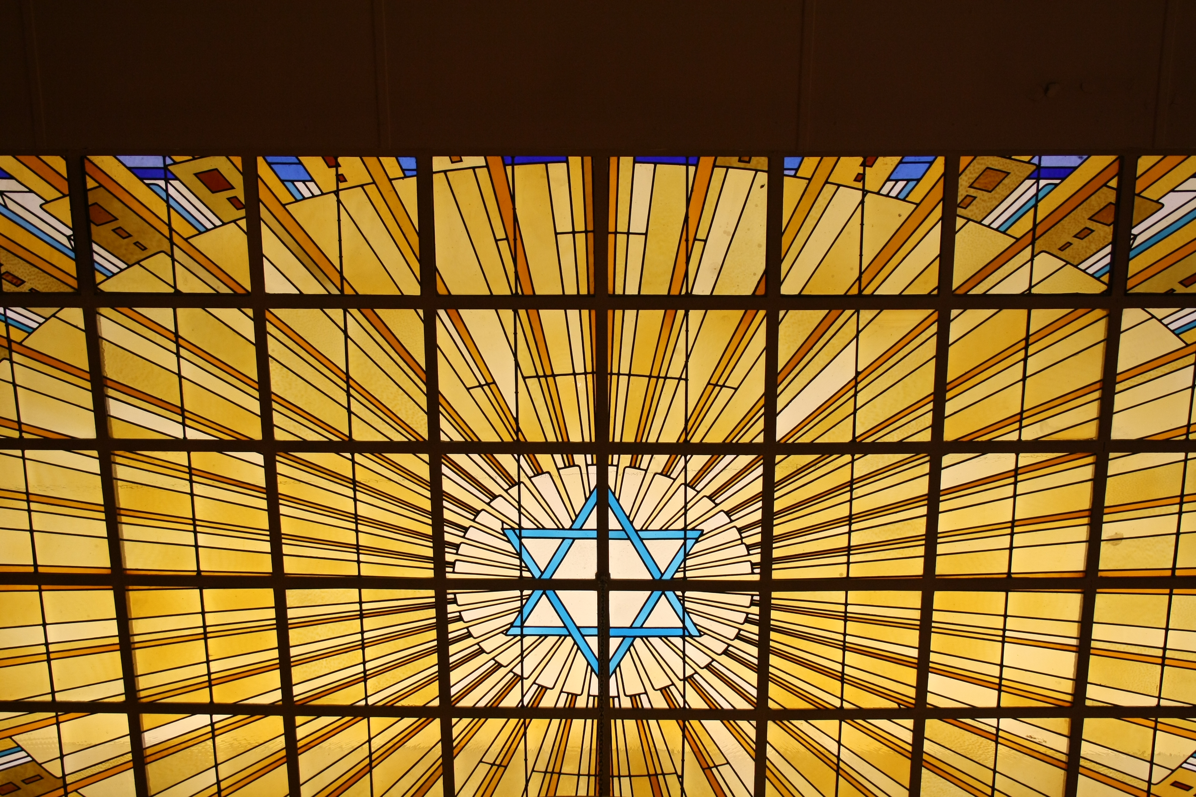 Synagoge der Rue Copernic (auch Synagoge der Union Libérale Israélite de France genannt), 24, rue Copernic, im 16. Arrondissement von Paris, Oberlicht mit Davidstern